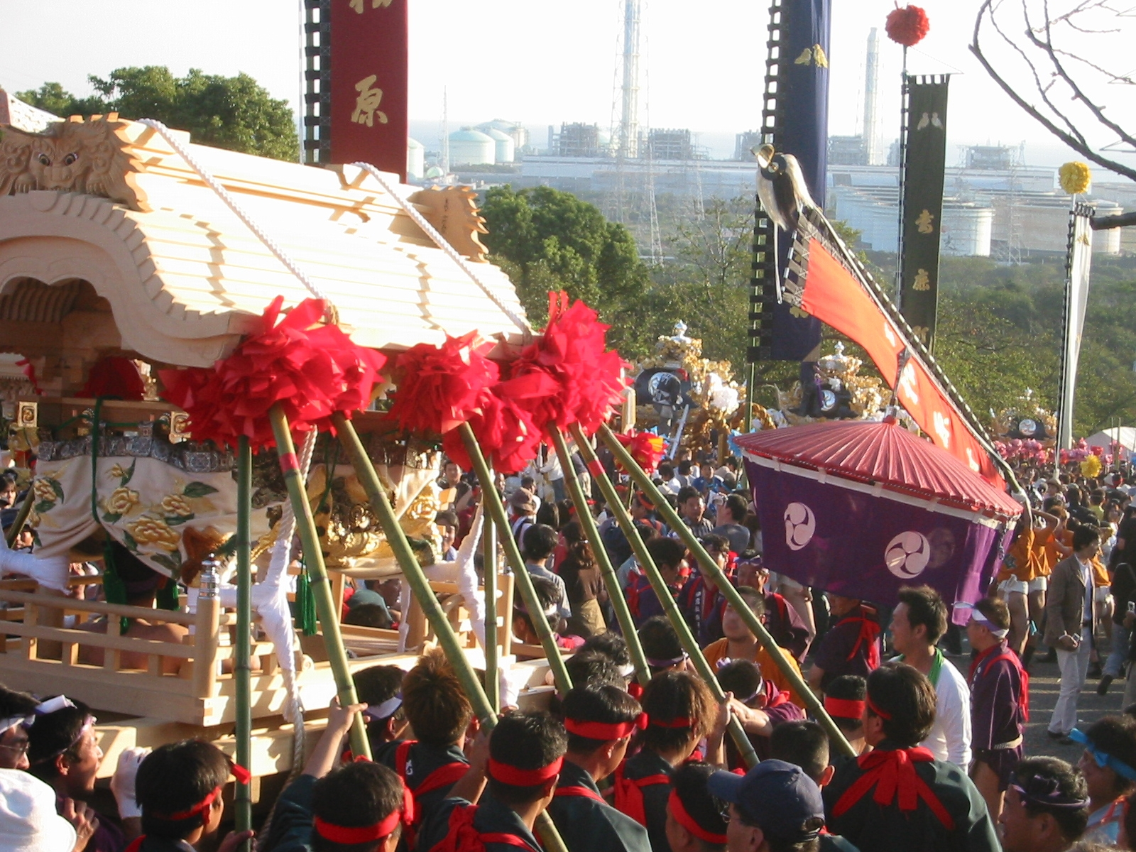 本宮灘のけんか祭り